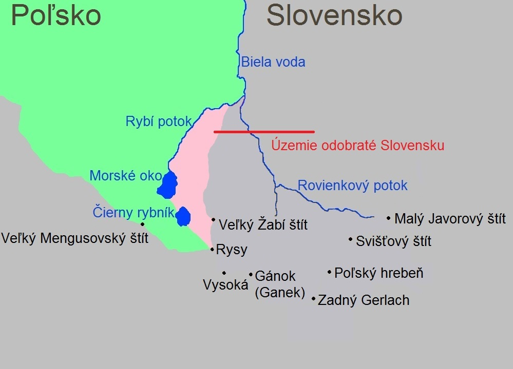 Mapa odobratého slovenského územia